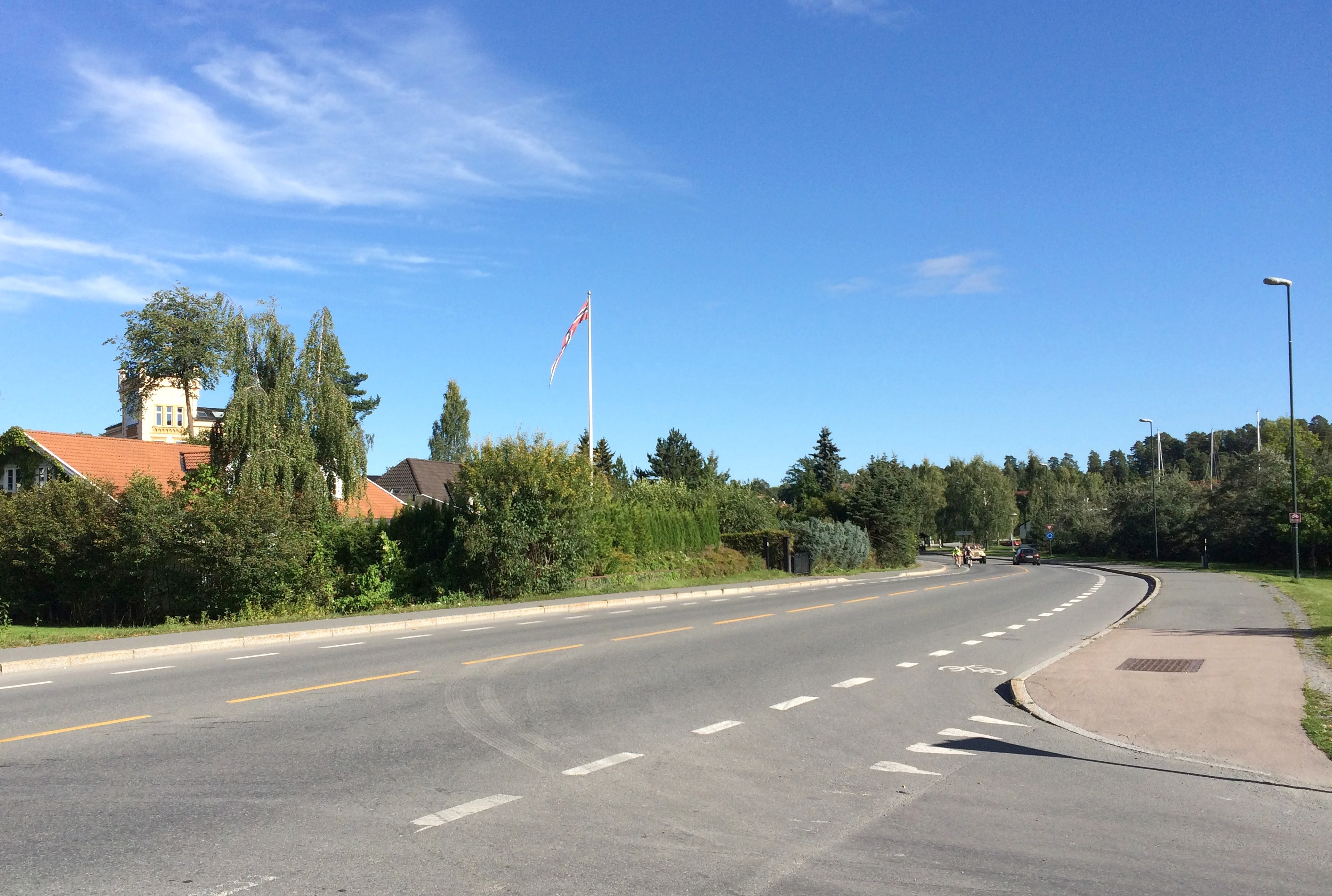 Blommenholm-enden av fylkesvei 605 (Sandviksveien)